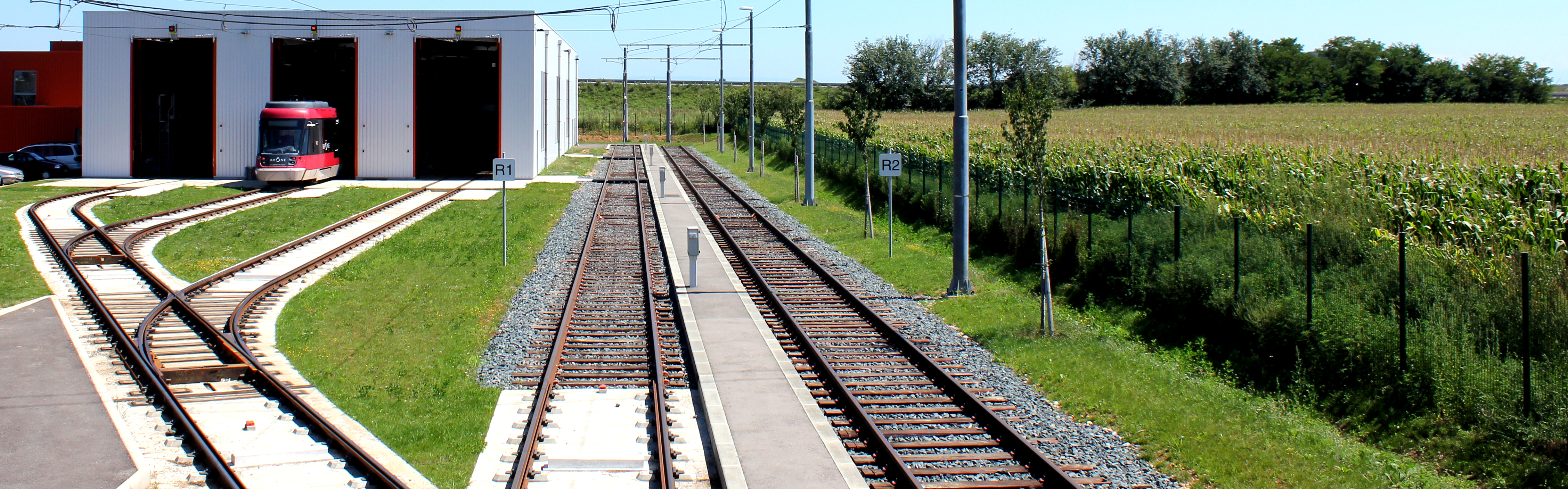 On vois ici les 3 voies d'atelier, dont la voie centrale est sur fosse, ainsi que les deux voies de remisage situé sur le coté gauche du centre de maintenance.